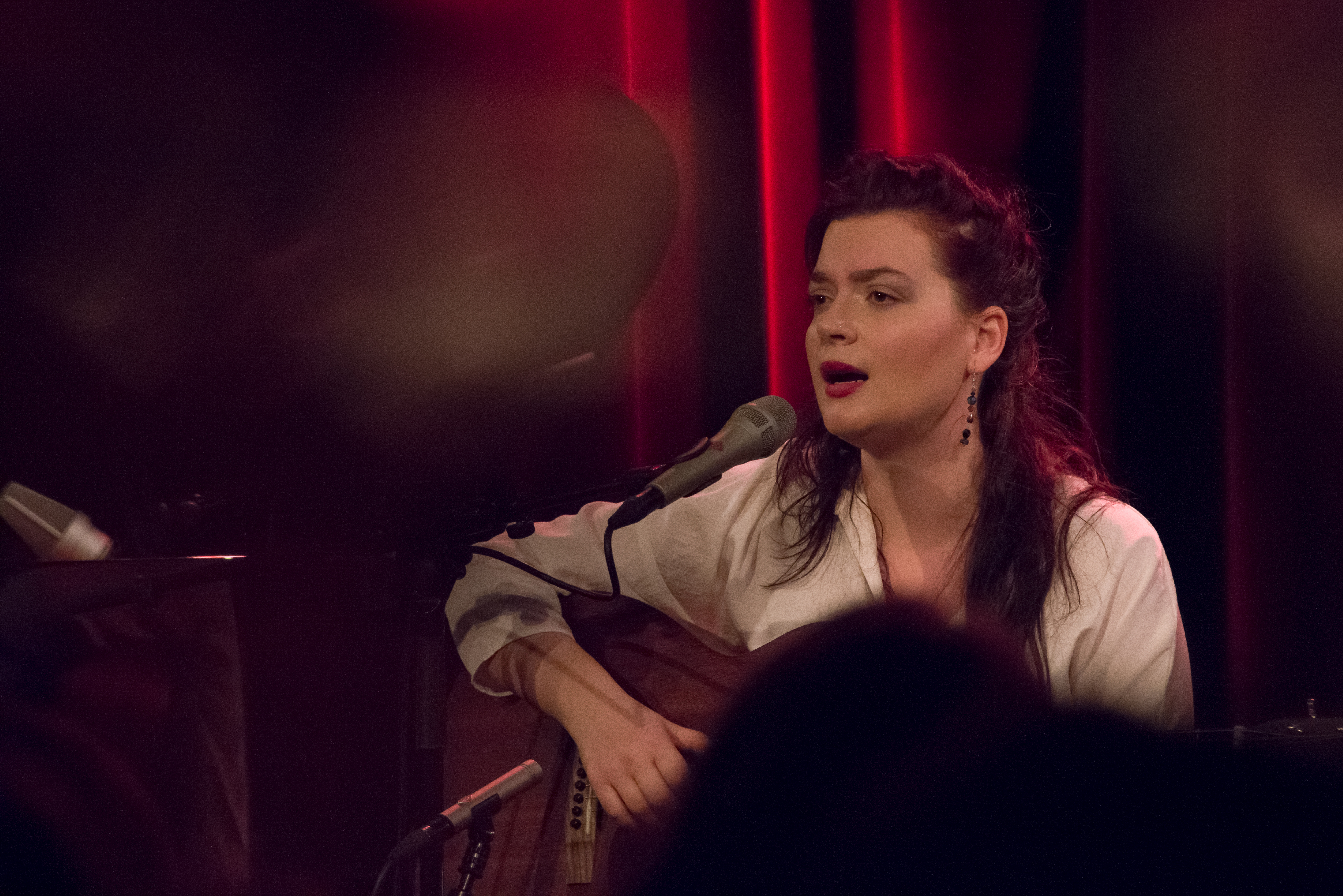 Аҧсшәа: Elina Duni spielt Gitarre während eines Konzerts in Biel, Schweiz.